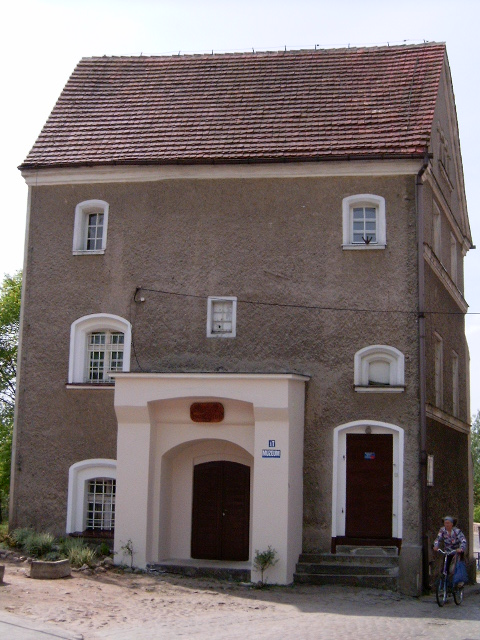 Widok od strony północnej na Bramę Żagańską